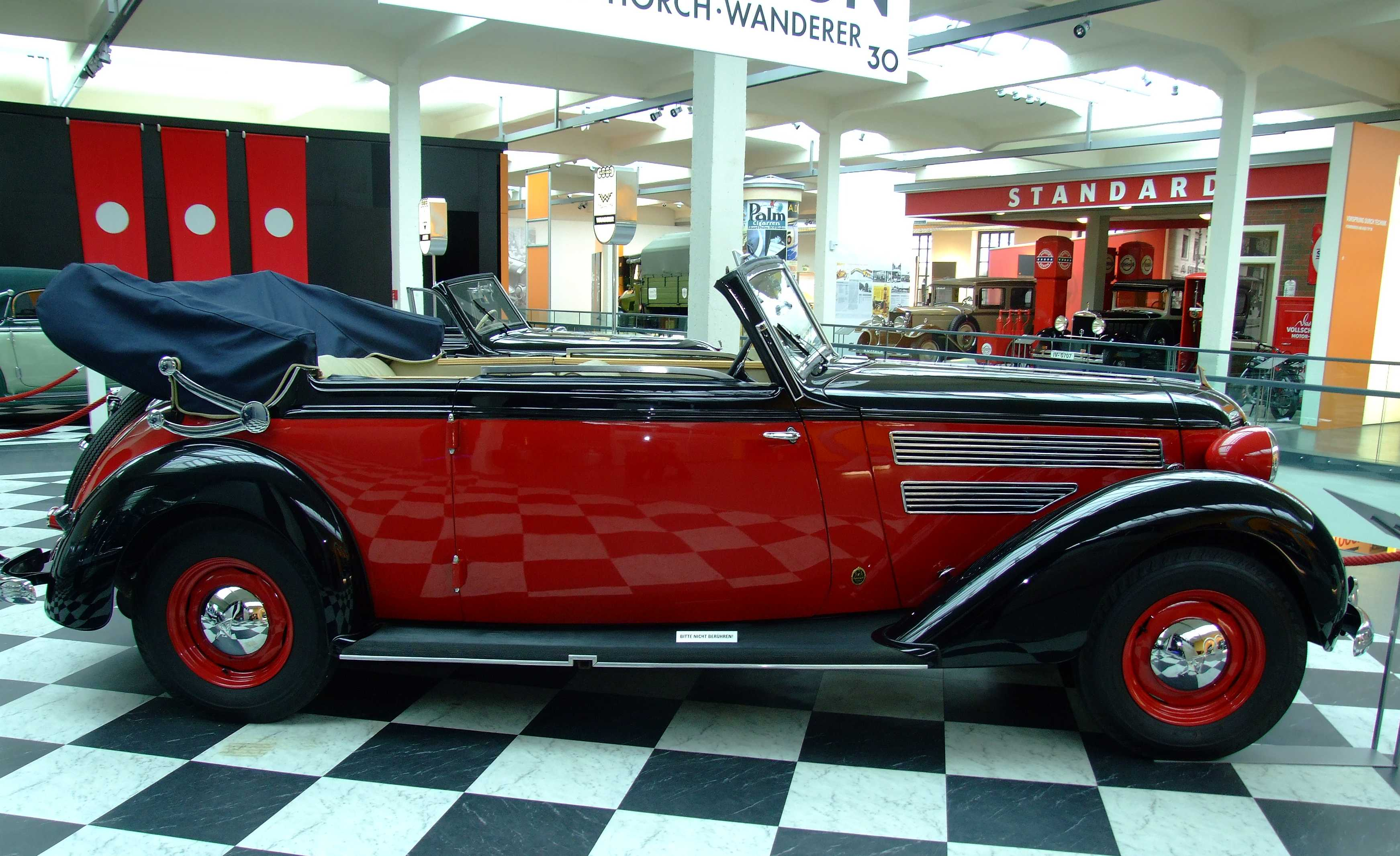 Audi 920 von 1939